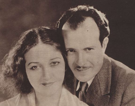 Los actores españoles María Fernanda Ladrón de Guevara y Rafael Rivelles